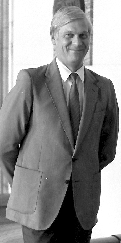 Kansanedustaja Pekka Starast, eduskunta 11. kesäkuuta 1985